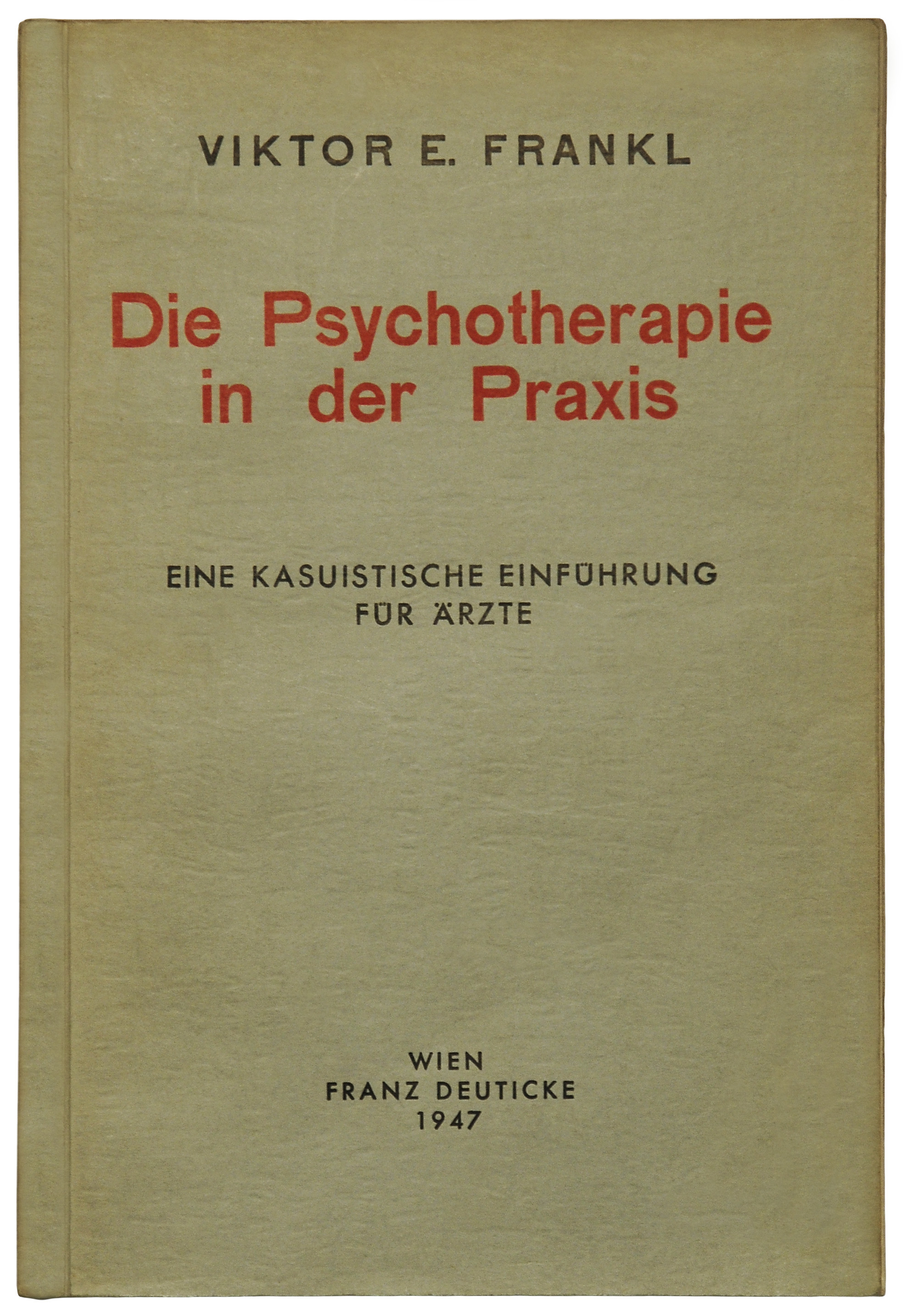 Viktor E. Frankl: Die Psychotherapie in der Praxis.Eine kasuistische Einführung für Ärzte. Wien: F. Deuticke 1947, 231 S. + 1 S. Verlagsanzeigen. 1.Auflage. Orig.-Broschur 22,5 x 15 cm. Sammlung H.-P.Haack, Foto H.-P.Haack. --H.-P.Haack (talk) 15:06, 7 December 2009 (UTC)